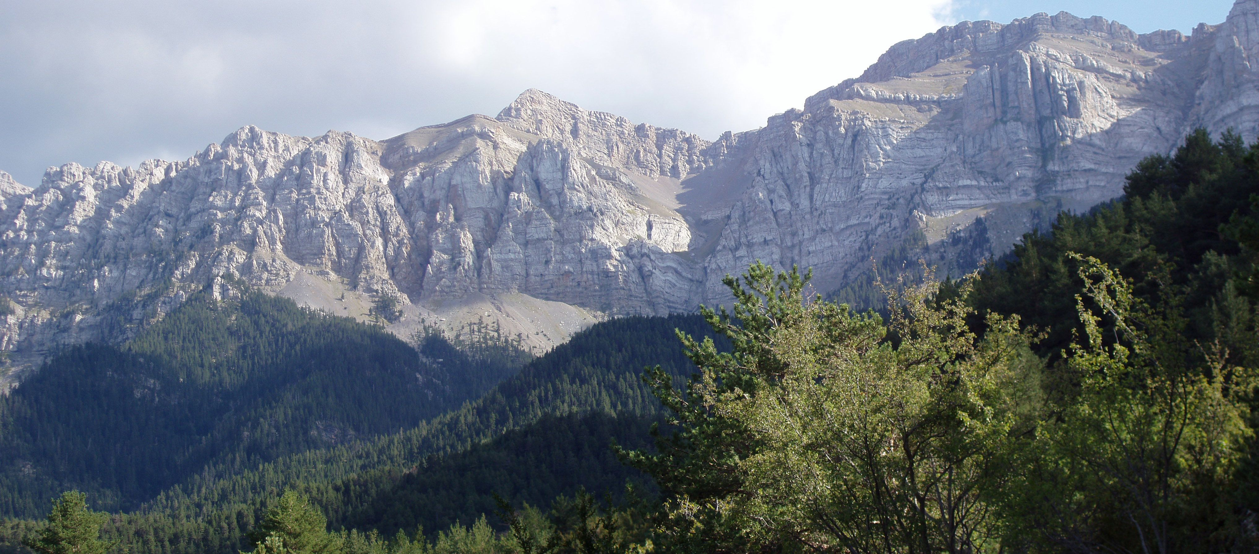 Panoràmica de la «Serra Cabirolera», vista des de «Prat de Cadí».